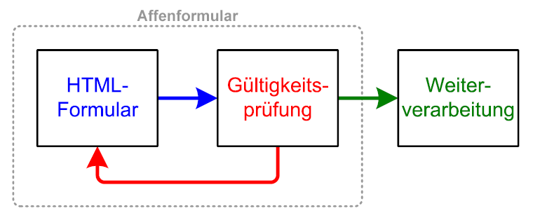 Struktur eines Affenformulars